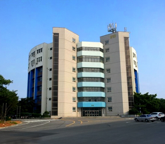 한국어 (조선): 중앙대학교 원형관